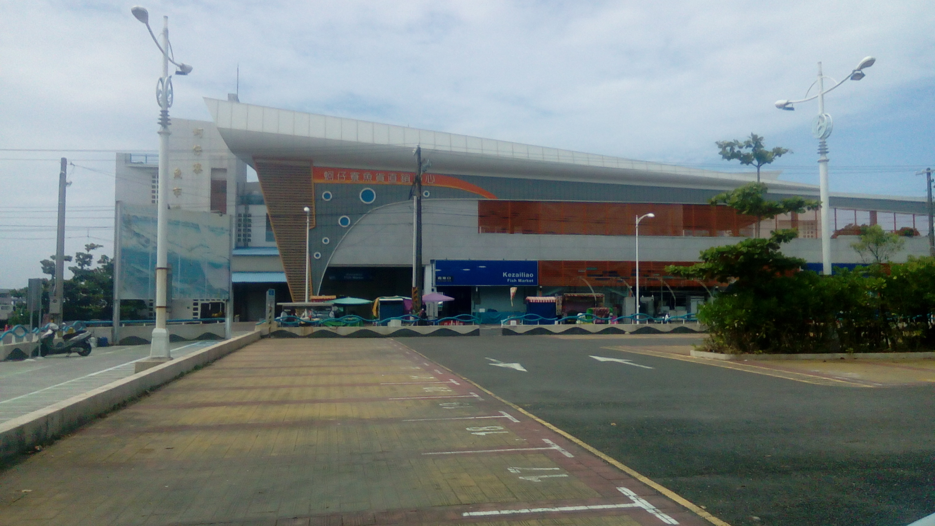 蚵仔寮魚市場大樓